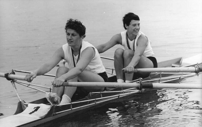 Gisela Jäger, Rita Schmidt Zentralbild Franke 20.7.70 Brandenburg (Havel): DDR-Meisterschaften im Rudern (Finale am 19.7.70)- Die Doppelzweier-Europameister Gisela Jaeger (links) und Rita Schmidt (RG Motor Baumschulenweg-Luftfahrt Berlin) kamen erwartungsgemäß zum Titelgewinn.